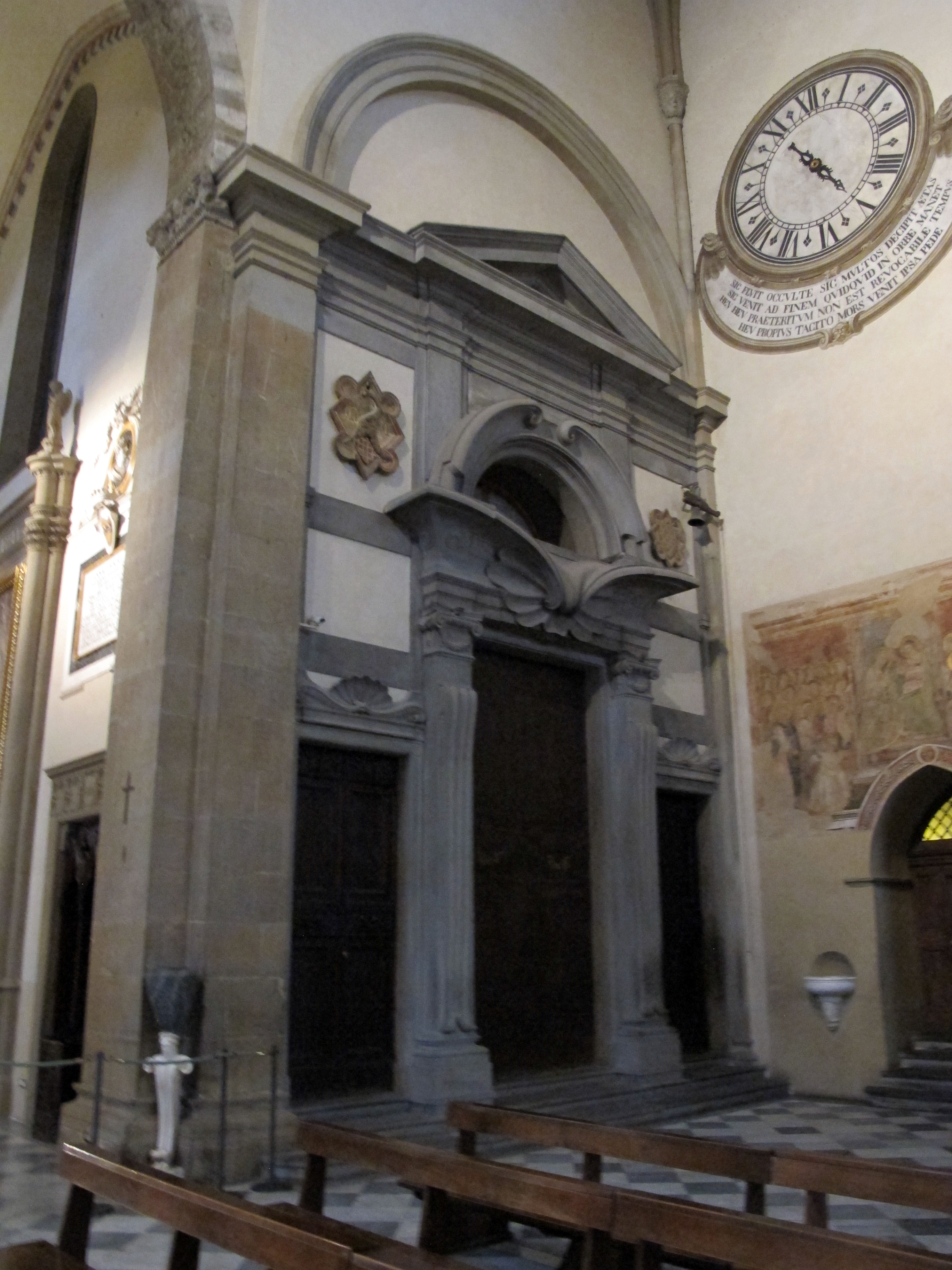 Smn, transetto sx, porta della sagrestia su disegno di fabrizio boschi